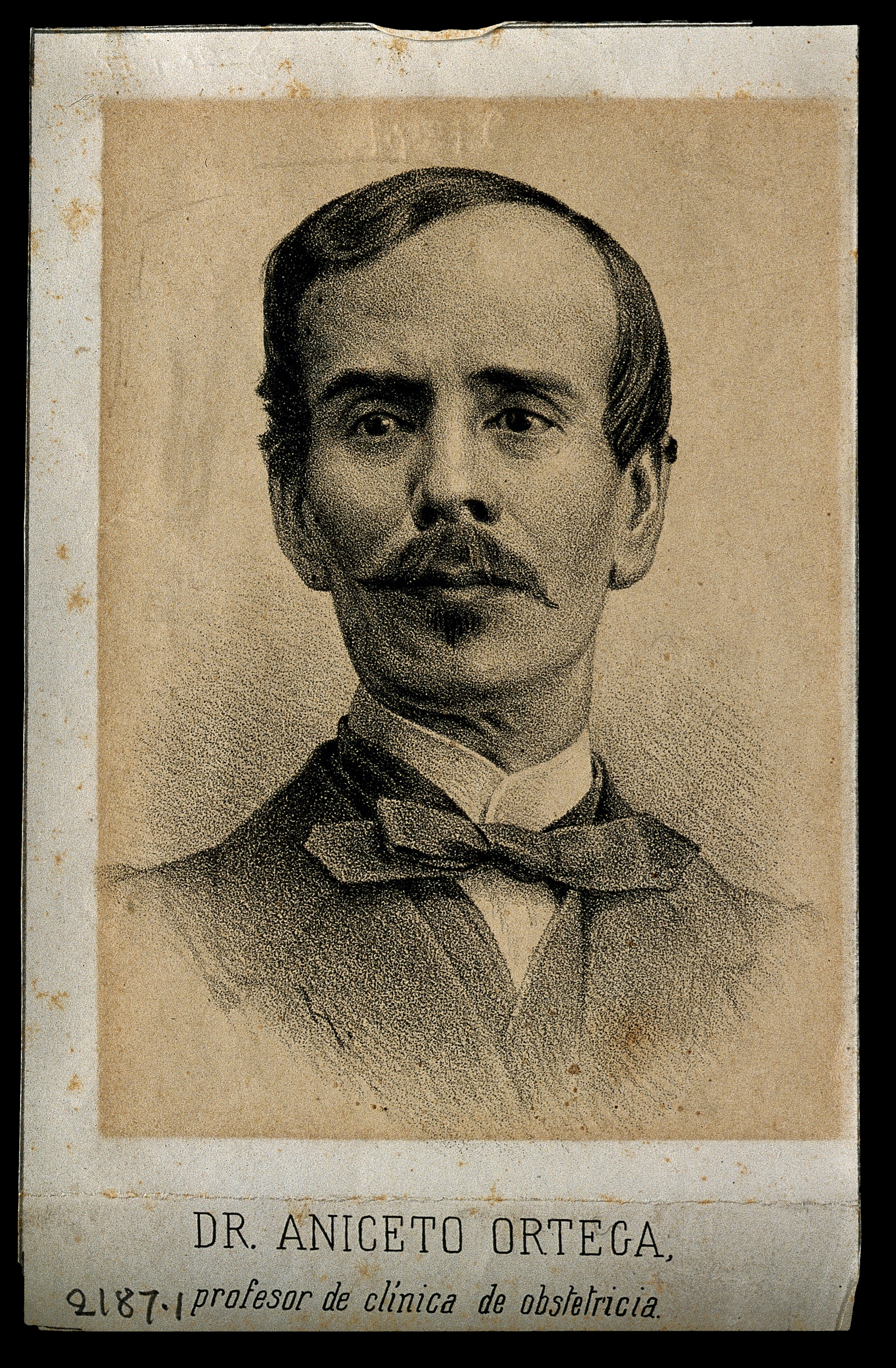 Genre/Technique: Portrait prints. Lithographs. Suject name: Ortega, Aniceta, fl. ca. 1860.